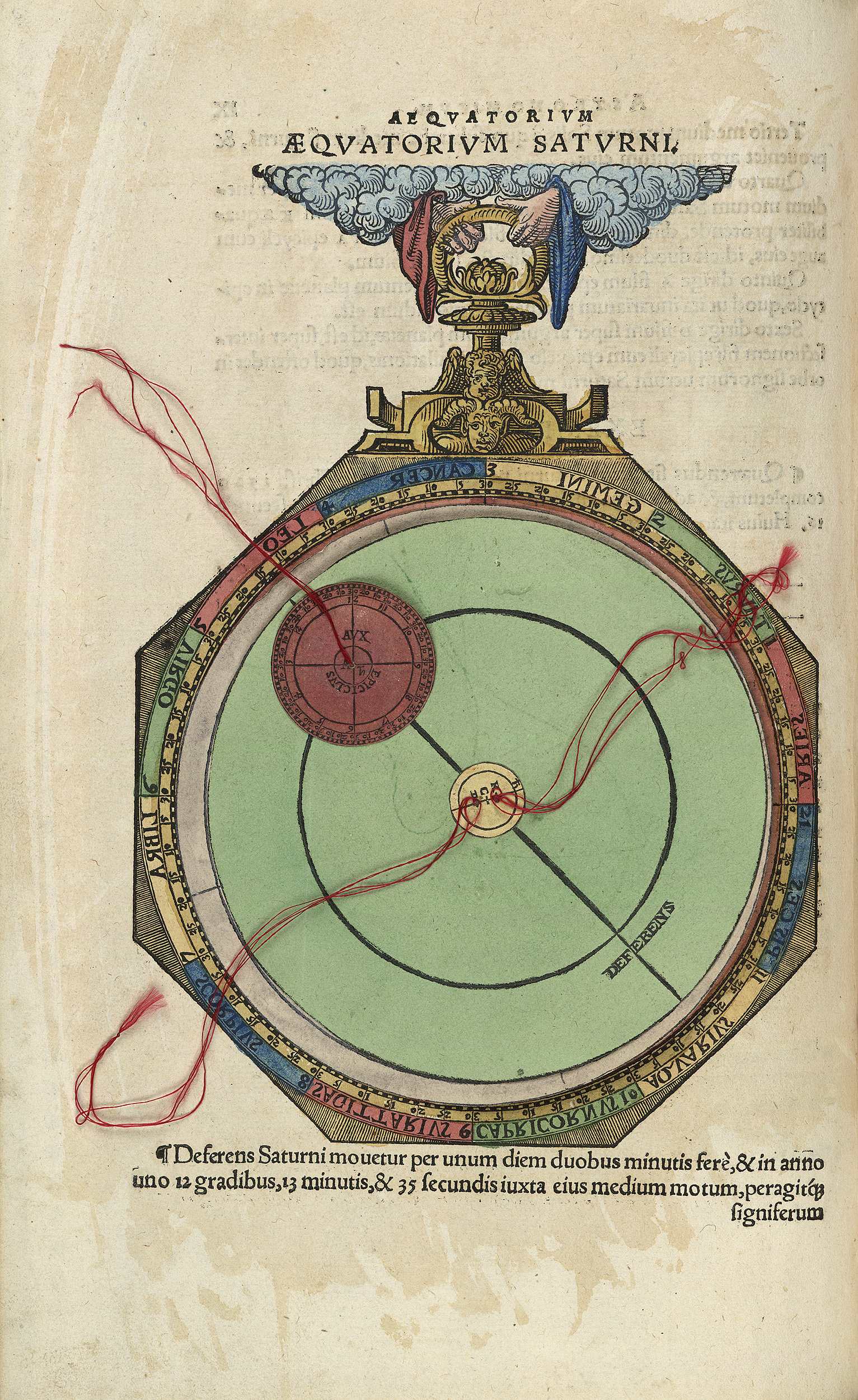 Johann Schöner: Äquatorium aus Papier zur Darstellung der Planetenbahn des Saturn)